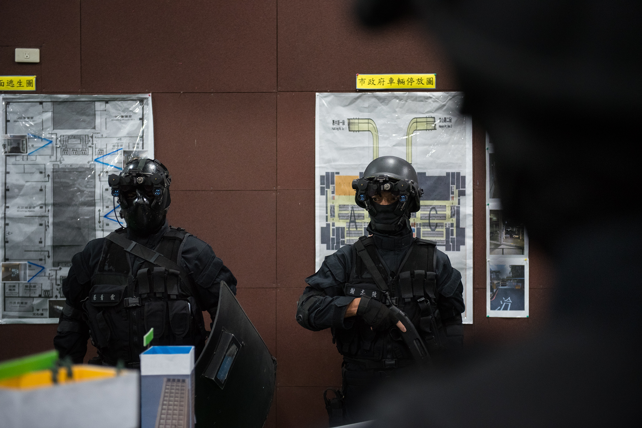 文言: 07.20 總統視導陸軍航特部高空特種勤務中隊